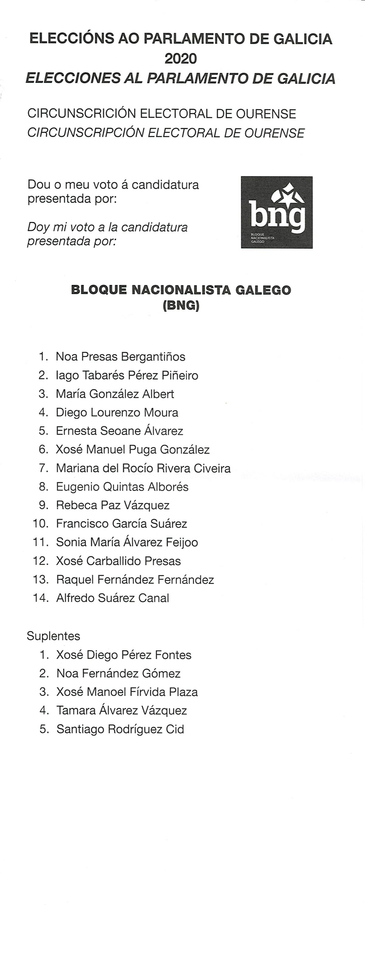 Papeletas electorais Eleccións ao Parlamento de Galicia 2020 circunscrición electoral de Ourense - xullo - BNG